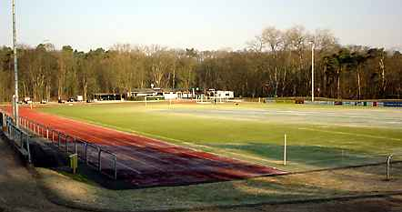 Sportplatz des SV Gonsenheim nach Sanierung